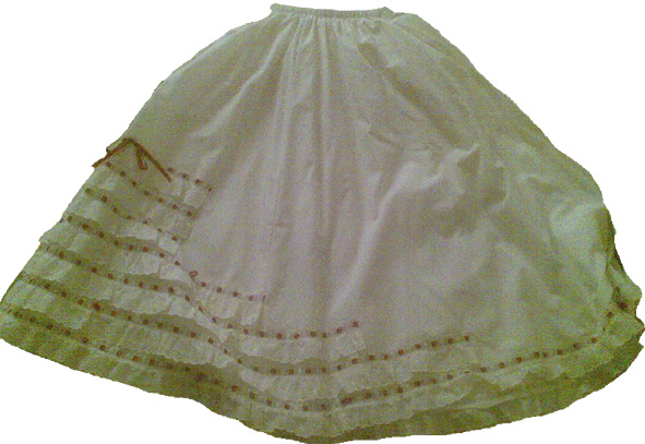 enaguas de traje de la panda de verdiales San Isidro de Periana